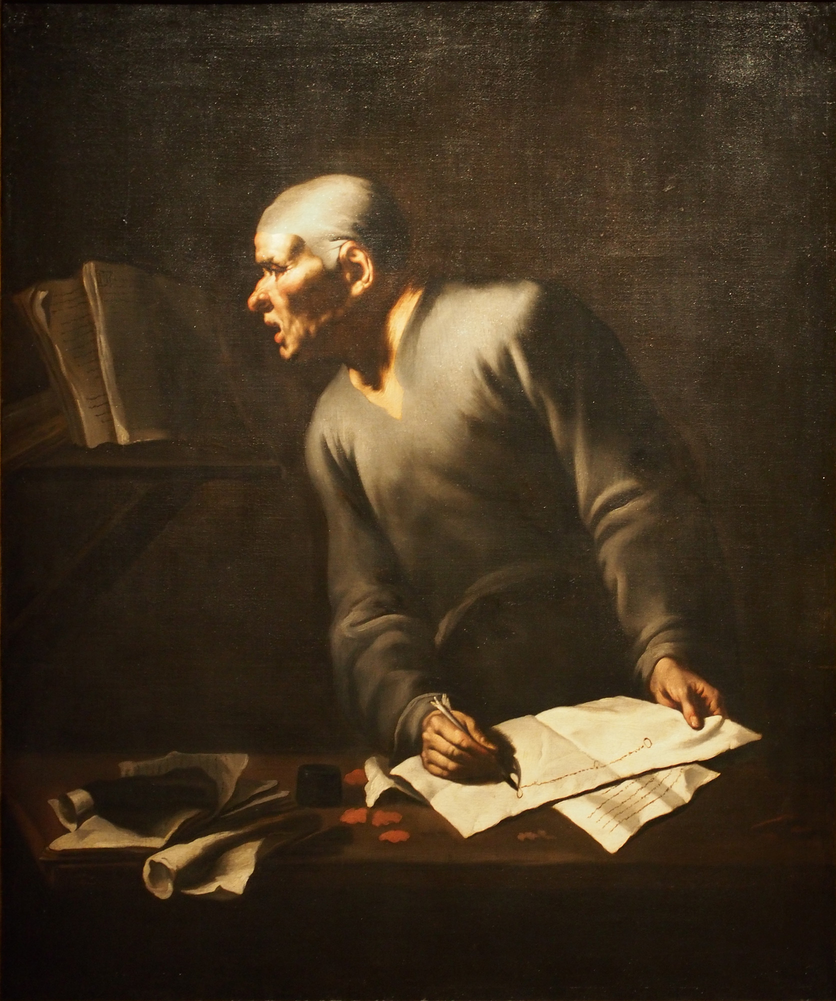 Filósofo escribiendo; 1620-1650. Maestro de la Anunciación a los Pastores. Musée des Beaux Arts de Pau.